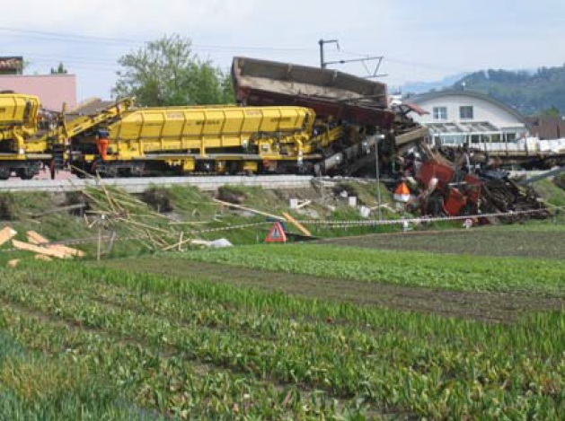 Aufprall eines Dienstzuges des BLS auf eine stehende Wagengruppe am Mittwoch, 17. Mai 2006 in in Dürrenast bei Thun.